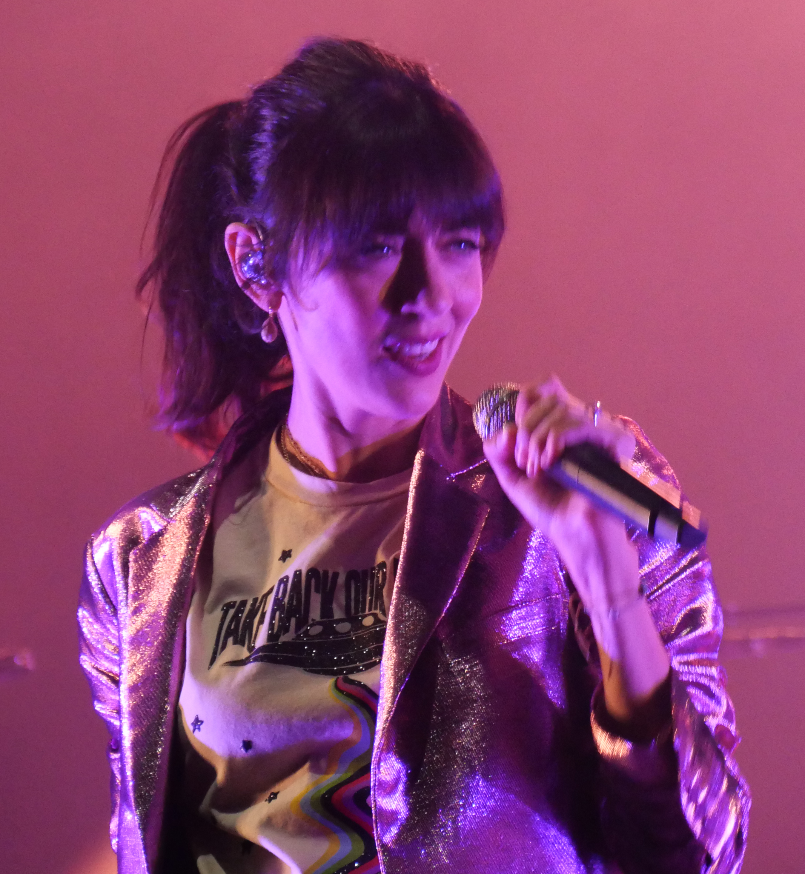 Nolwenn Leroy en concert le 15/09/2018 à Clamart